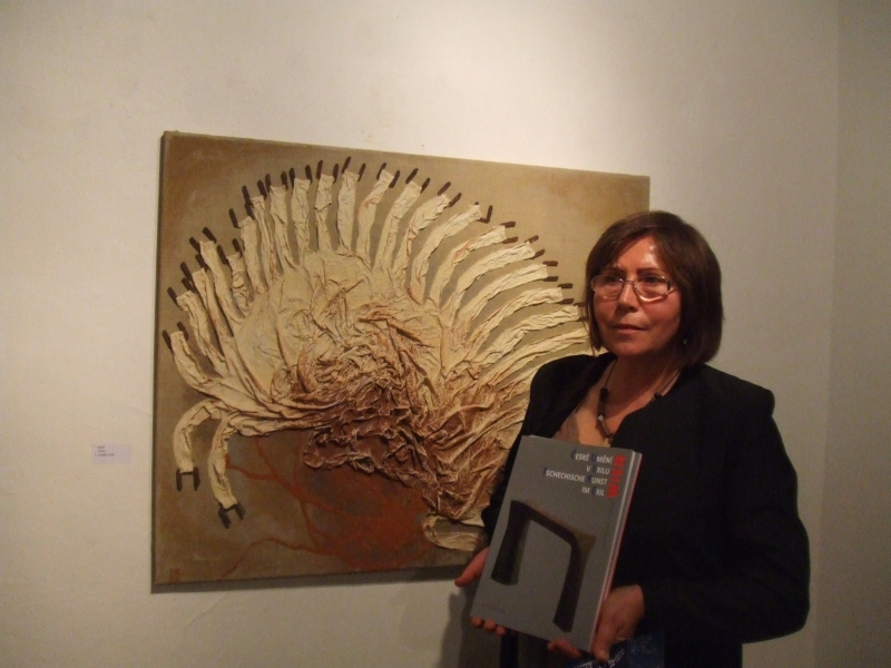 Irena Ráček vor einem Ihrer Werke bei einer Katalogpräsentation.